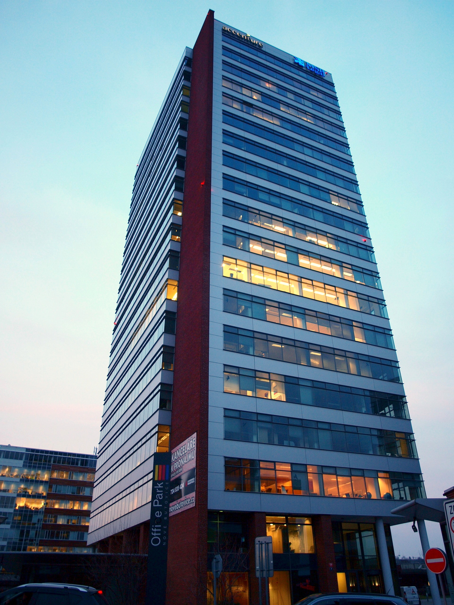 Budova Accenture Nové Butovice